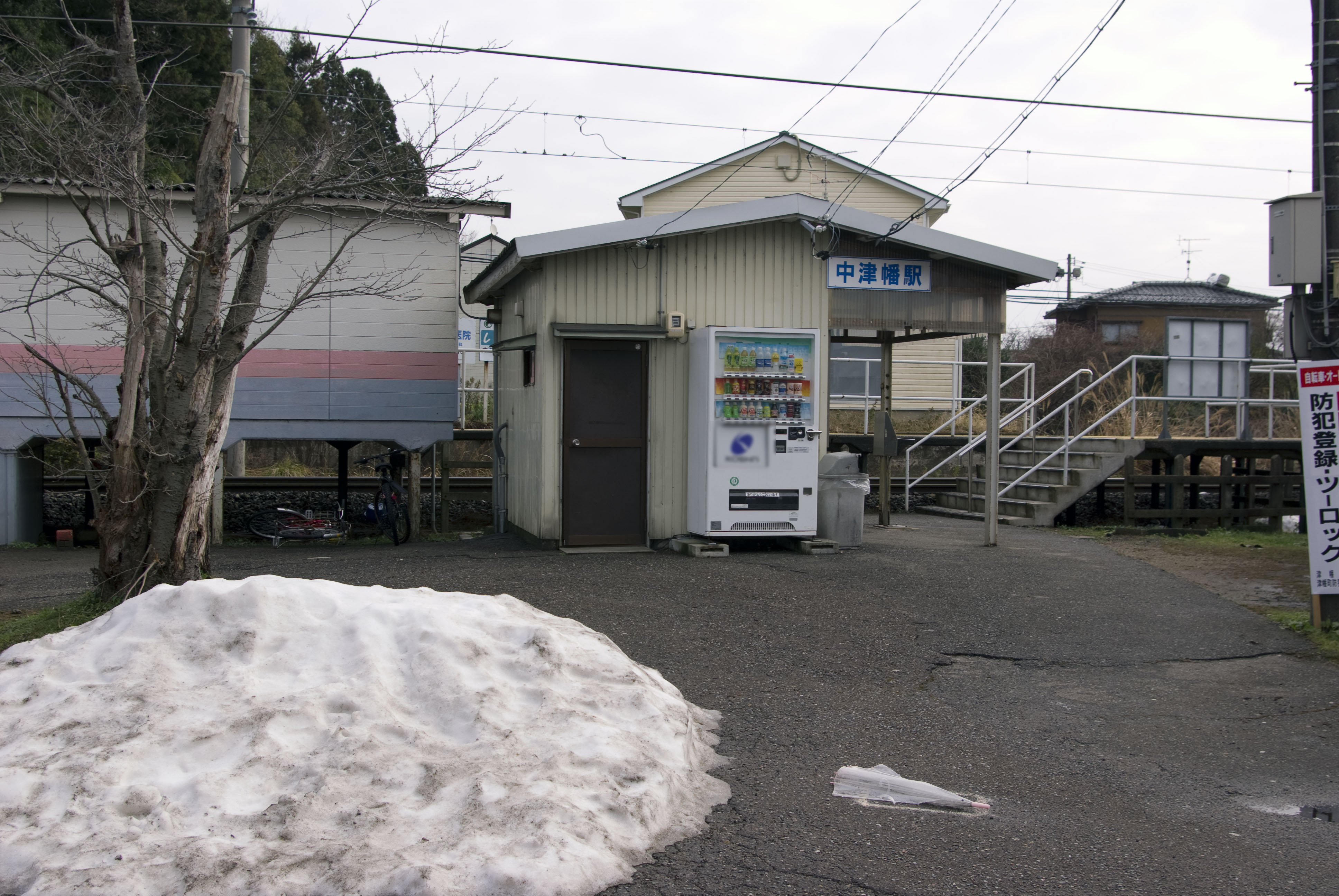 西日本旅客鉄道七尾線中津幡駅